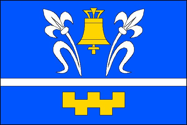 Vlajka obce Bavory